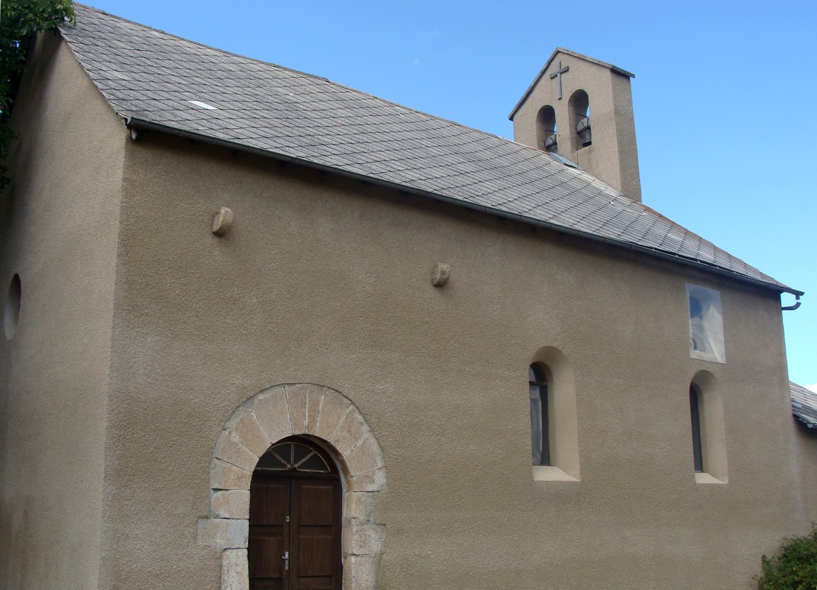 La petite église du village de Rousset (Hautes-Alpes).